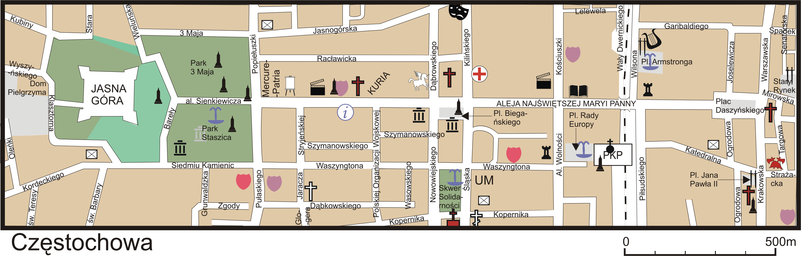 Legenda Ogólne zabudowaniaparki, skweryłąki Kultura ważniejsze galerie: Miejska Galeria Sztuki - al. NMPważniejsze ośrodki promocji kultury: Ośrodek Promocji Kultury „Gaude Mater” - ul. Dąbrowskiego kina: Ośrodek Kultury Filmowej - al. NMP Cinema City „Wolność” - al. T. Kościuszki teatry: Teatr Dramatyczny im. A. Mickiewicza - róg ul. ul. Jasnogórskiej i J. Kilińskiegofilharmonie: Filharmonia Częstochowska - róg ul. ul. T.W. Wilsona i G. Garibaldiego Edukacja szkoły średnie: Liceum Plastyczne im. J. Malczewskiego - ul. K. Pułaskiego IV LO. im. H. Sienkiwicza - al. NMP I LO im. J. Słowackiego - al. T. Kościuszki V LO im. A. Mickiewicza - ul. Krakowska Zespół Szkół Elektroniczno-Mechanicznych - na wschód od archikatedry (faktycznie ul. Targowa)szkoły wyższe: Akademia Polonijna - róg ul. ul. Siedmiu Kamienic i Pułaskiego Akademia Jana Długosza - ul. J. Waszyngtonamuzea: Muzeum Częstochowskie - wszystkie obiekty zaznaczonebiblioteki (pominięto filie): Biblioteka Miejska - al. NMPinne jednostki: obserwatorium astronomiczne - Park St. Staszica Turystyka informacja turystyczna: punkt informacji turystycznej Urzędu Miasta - al. NMPzabytkowe kościoły rzymskokatolickie: pw. Najświętszego Imienia Maryi - al. NMP, koło LO Sienkiewicza pw. św. Jakuba - otoczony al. NMP i ul. ul. J.H. Dąbrowskiego, Racławicką, Kilińskiego pw. św. Zygmunta - pl. I. Daszyńskiego Archikatedra pw. Świętej Rodziny - pl. Jana Pawła II, ul. ul. Krakowska i Ogrodowakościoły rzymskokatolickiekaplicecerkwiezabytkowe kościoły protestanckie: pw. Wniebowstąpienia Pańskiego (ewengelicko-augsburski) - ul. M. KopernikapomnikiMiejsca Pamięci Narodowejinne atrakcje turystyczne: Dom Biegańskiego - vis-à-vis stacji PKP Dom Frankego - al. NMP Varia Stacje pogotowia ratunkowego: Stacja Pogotowia Ratunkowego - ul. J. Kilińskiegojednostki Straży Pożarnejurzędy pocztowefontanny Skróty literowe UMUrząd MiastaPKPstacja PKP Częstochowa Osobowa